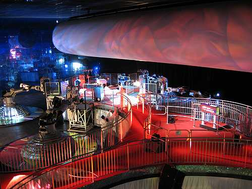 Vue intérieure du Pavillon des Robocoasters avec l'attraction Danse avec les Robots. Peter Hacker 2006-03-29 serial no. 891-9178 Photographie personnelle de PeterHacker.